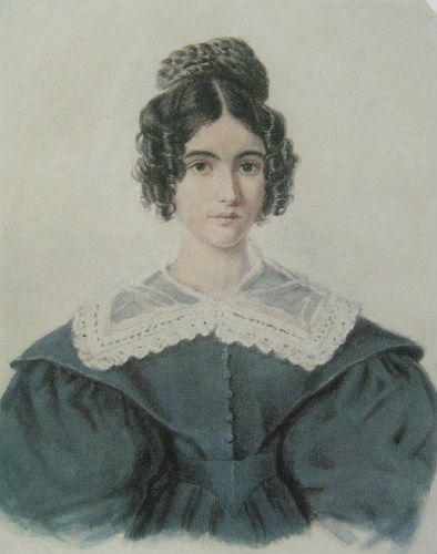 Мария Васильевна Малиновская (1809—1899), в 1834 году стала женой В. Д. Вольховского.